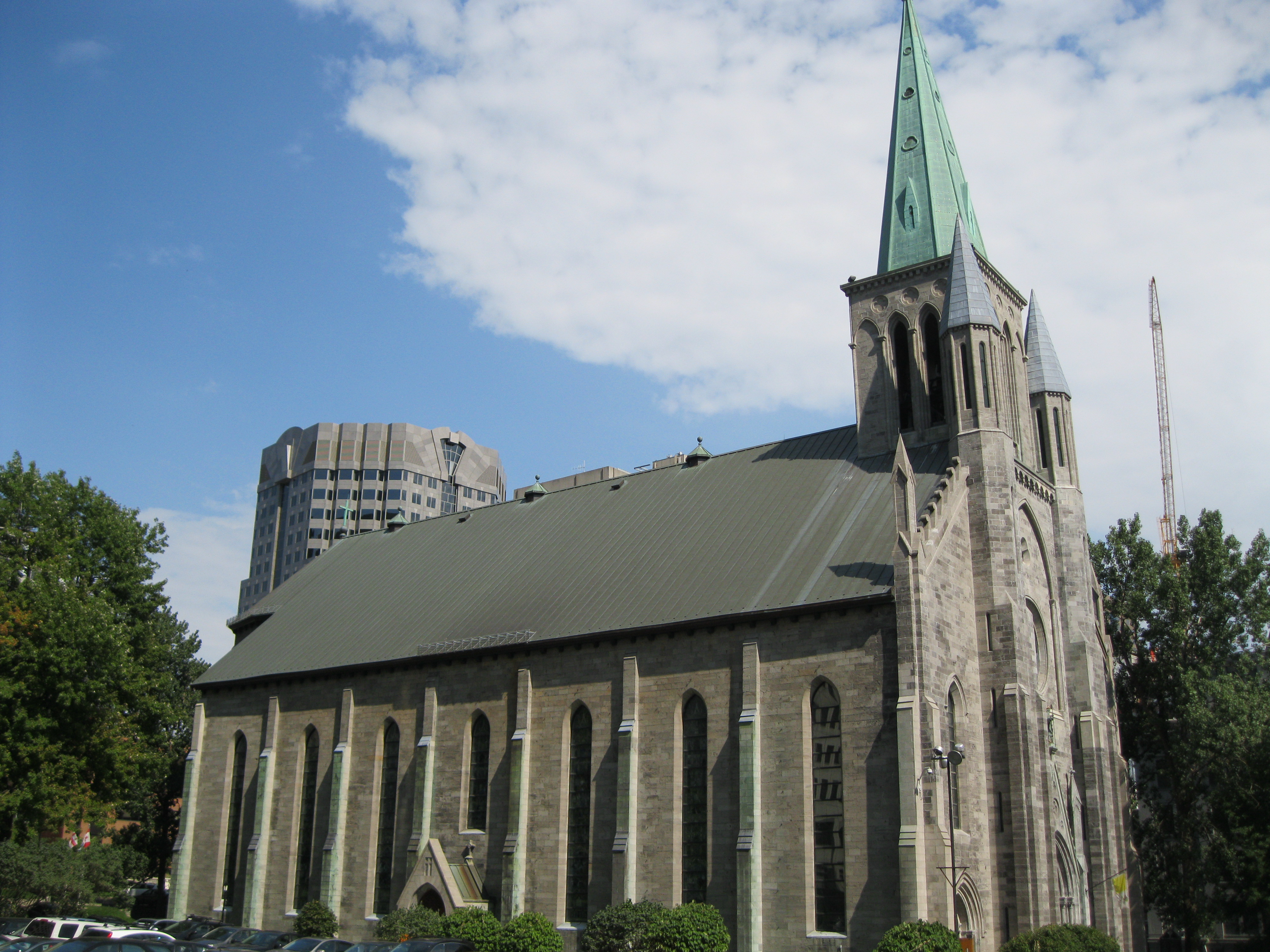 Basilique Saint-Patrick, Montréal